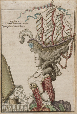 Coiffure à l’indépendance ou Le triomphe de la liberté: (am französischen Hof getragene) Frisur zur Feier eines Sieges im Amerikanischen Unabhängigkeitskrieg (1775–1783). © Musée franco-américain du château de Blérancourt - RMN.